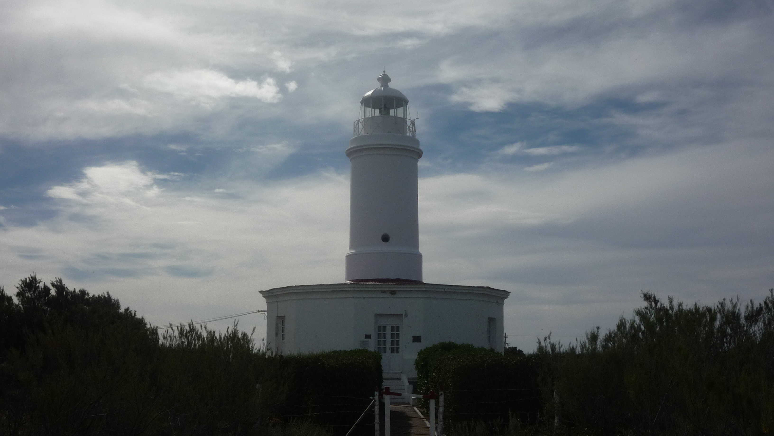 Faro Argentino ubicado en el balneario el condor